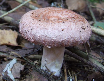 Lactarius torminosus. Karmėlava forest, Lithuania.